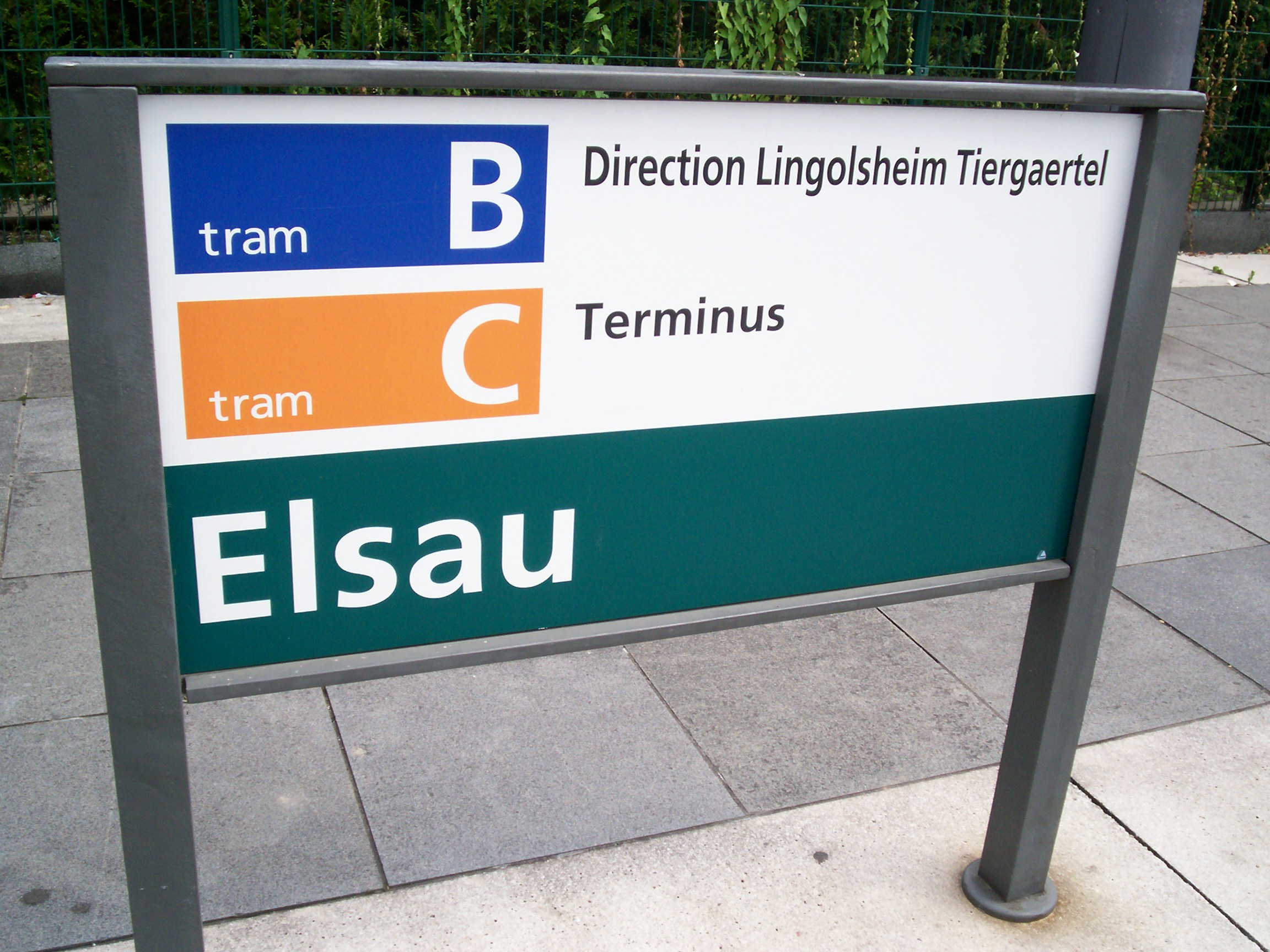 Signalétique ligne B et C à la station Elsau